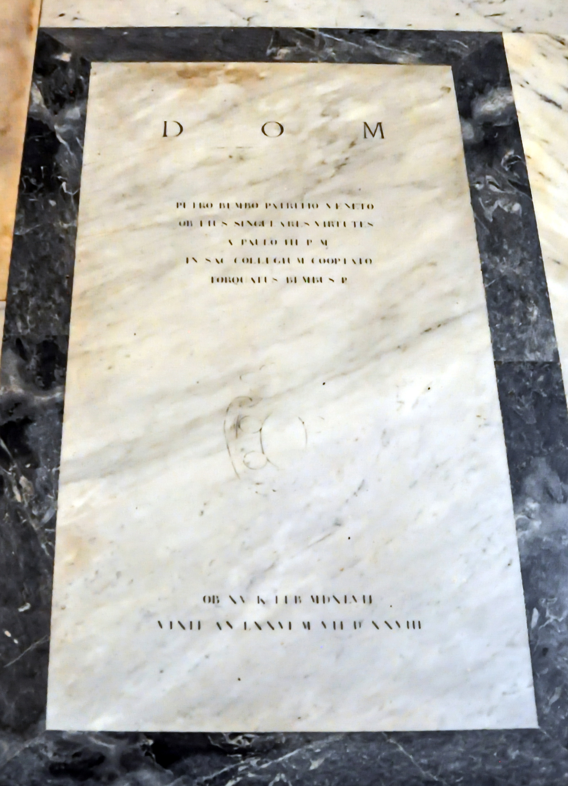 Santa Maria sopra Minerva (Rom), Chorkapelle Grabtafel für Kardinal Pietro Bembo